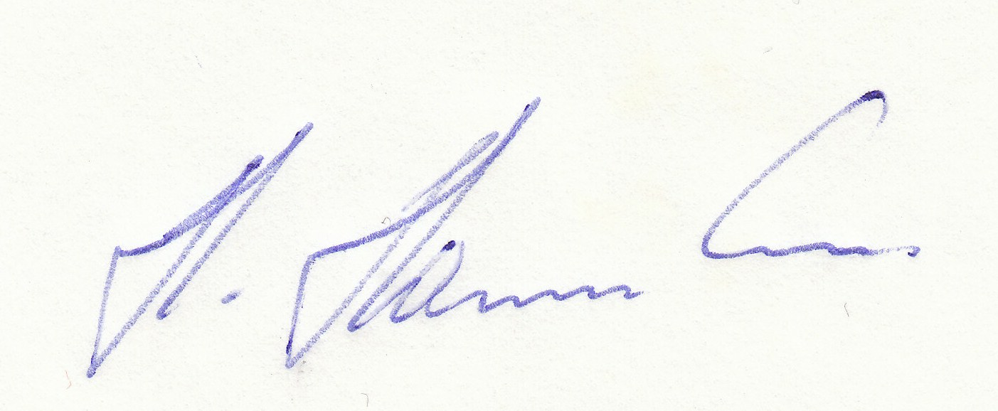 Autogramm des ehem. Bundesliga-Spielers von 1978